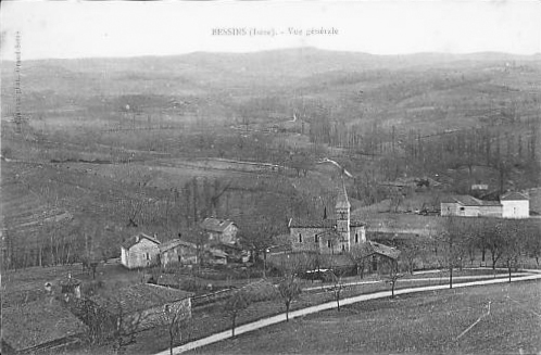 Bessins (Isère) vue générale